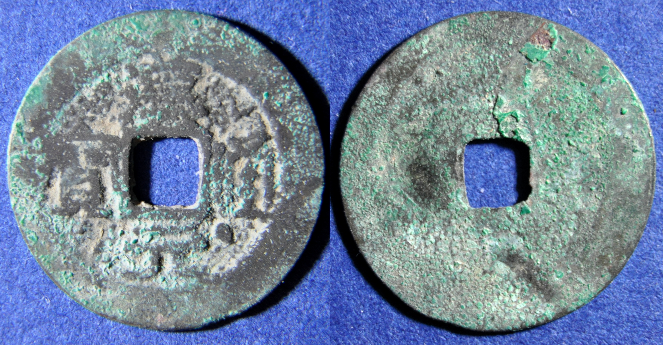 Une monnaie en cuivre d’une sapèque de Ho Han Thuong ( ?-1407), ère Han Nguyen (1401-1407), de la dynastie des Ho (1400-1407). A/ Han Nguyen thong bao (Monnaie courante de l’ère Han Nguyen), point à droite de Nguyen R/ vide Dimension : 20,84 mm Poids : 1,5 g. Cuivre Remarque : Ho Han Thuong est le fils de Ho Quy Ly qui lui cède le pouvoir en 1401. Ce sont les deux souverains de la dynastie Ho. Ho Quy Ly essaie d’obtenir l’investiture de l’empereur de Chine en prétextant que la dynastie Tran était éteinte. La cour Ming de Nanking, pour obtenir des informations exactes, envoie un commissaire impérial appelé Li pour enquêter. Celui-ci, dans son rapports, indique que ce sont uniquement des rebelles. En 1406, l’armée chinoise envahit le Dai Viet et les Ho sont vaincus en 1407 et faits prisonniers. Ils sont assassinés par leur escorte pendant leur transfert en Chine. Le caractère bao (à gauche) est écrit en sigillaire. Références : Toda 34, Barker 123.1 Indice de rareté : Peu commune ?